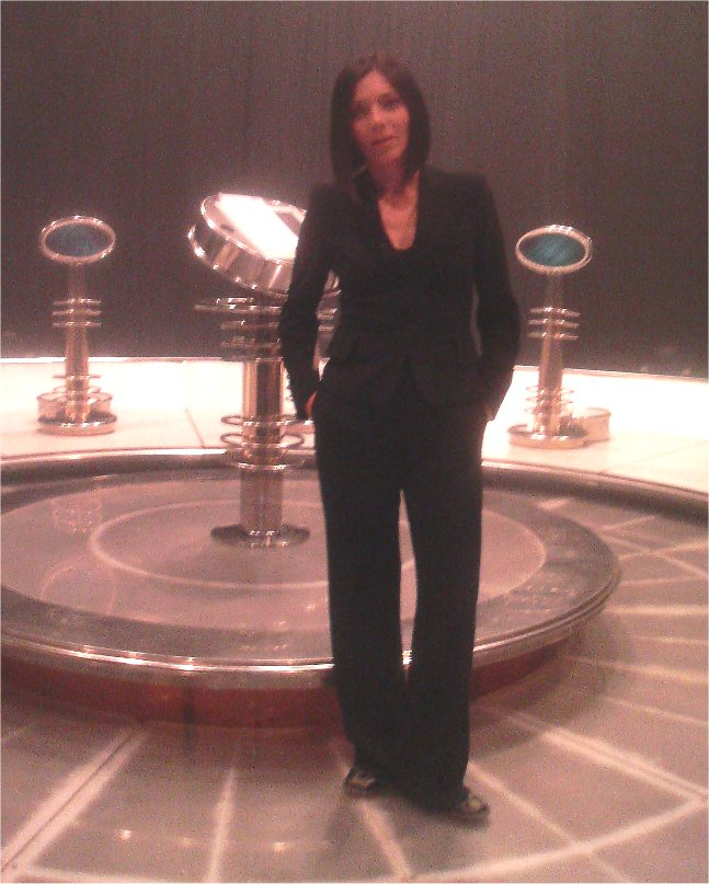 Daniela Trbović